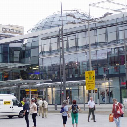 Neues Kugelhaus am Wiener Platz in Dresden